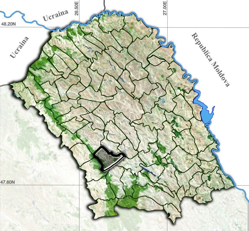 Curtesti jud Botosani.